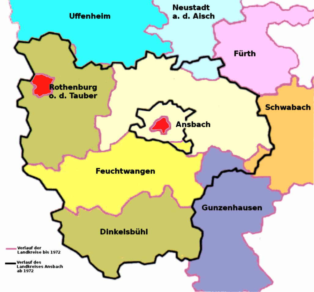 Zusammensetzung des mit dem am 1. Juli 1972 im Zuge der Gebietsreform erweiterten Landkreises Ansbach